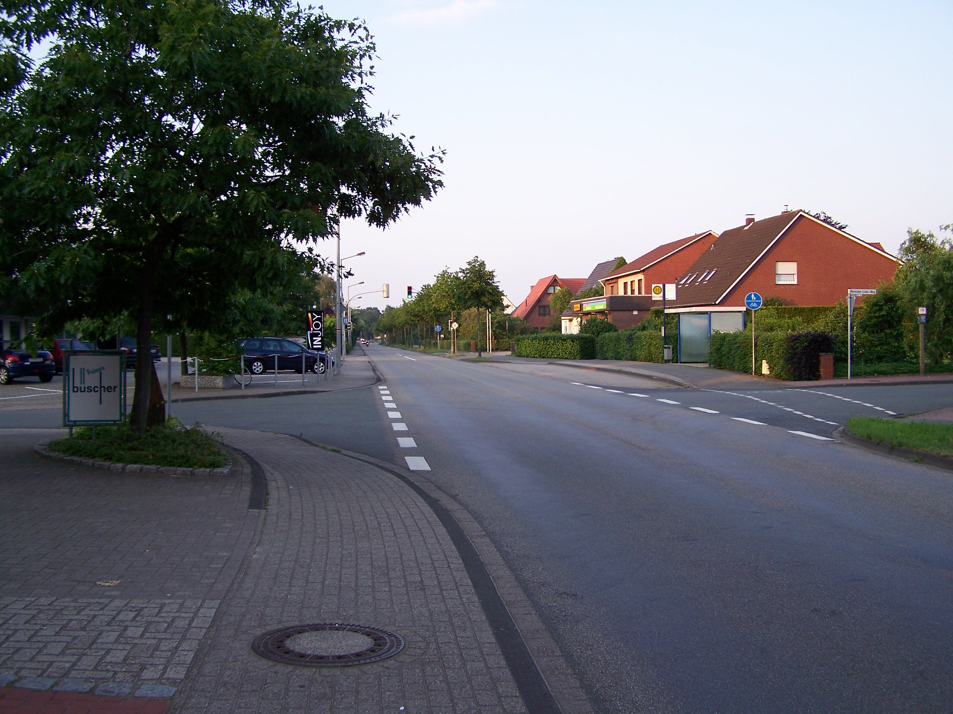 Die Hörsteler Straße (Landesstraße 598) in Obersteinbeck, Ortsteil von Recke, Kreis Steinfurt, Nordrhein-Westfalen, Deutschland.